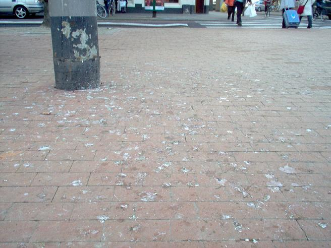 Duivenpoep op de Kruiskade in Rotterdam